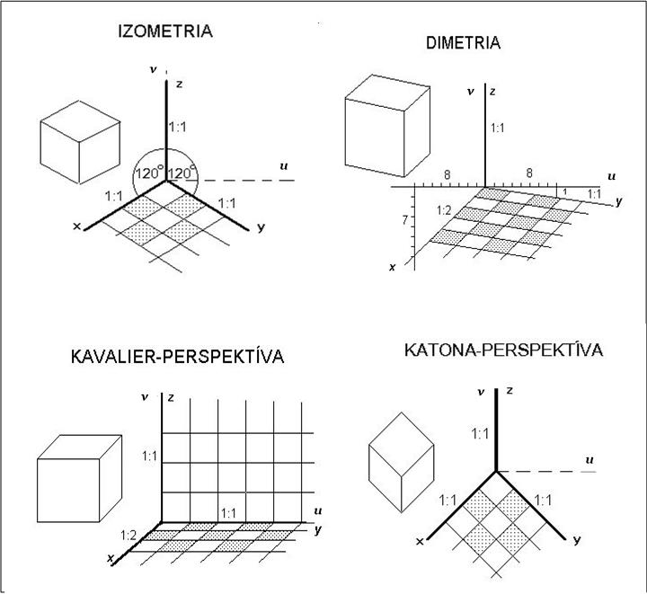 Axonometriai rendszerek